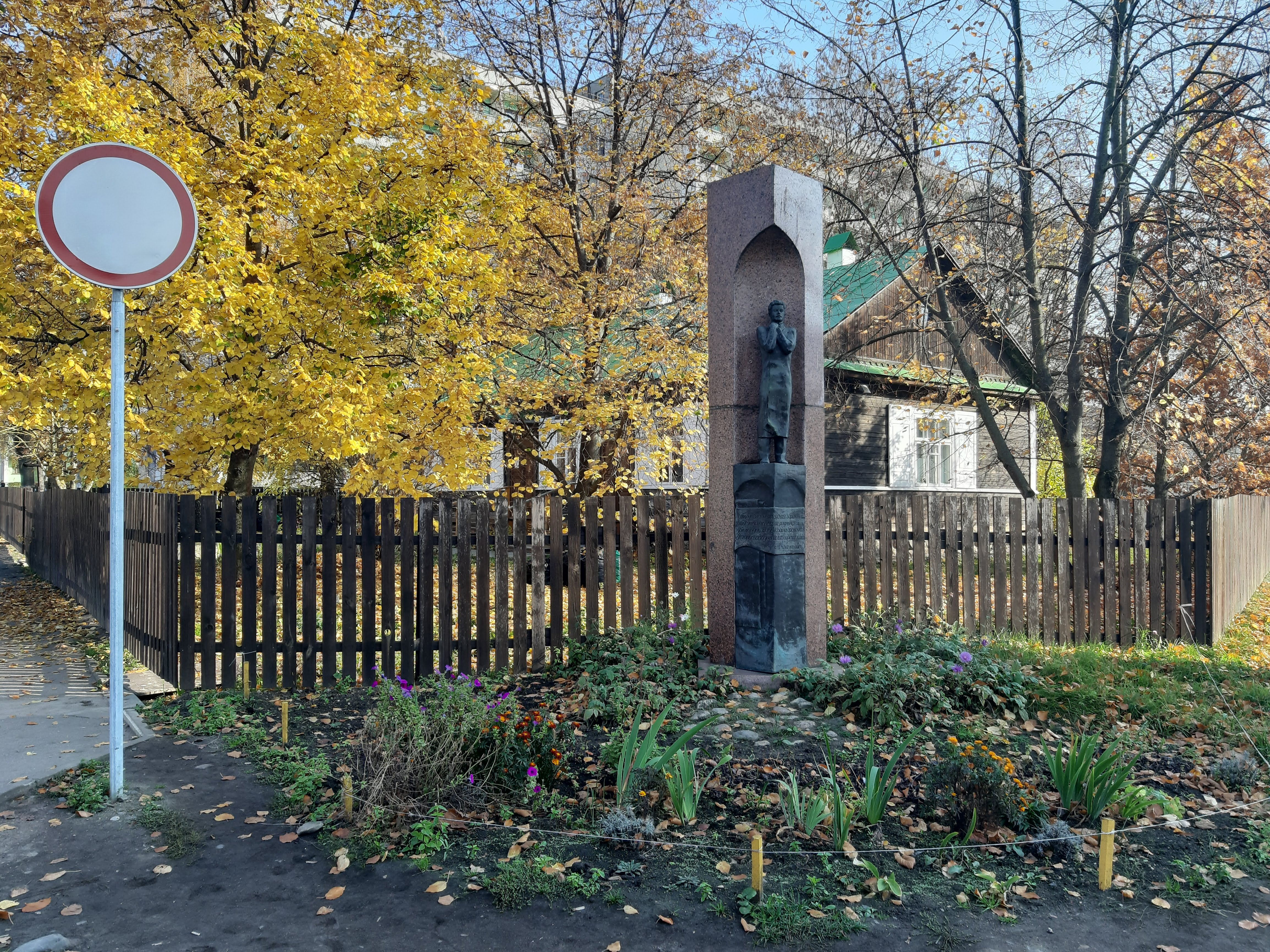 Мінск. З Добрых Мысляў у цэнтр